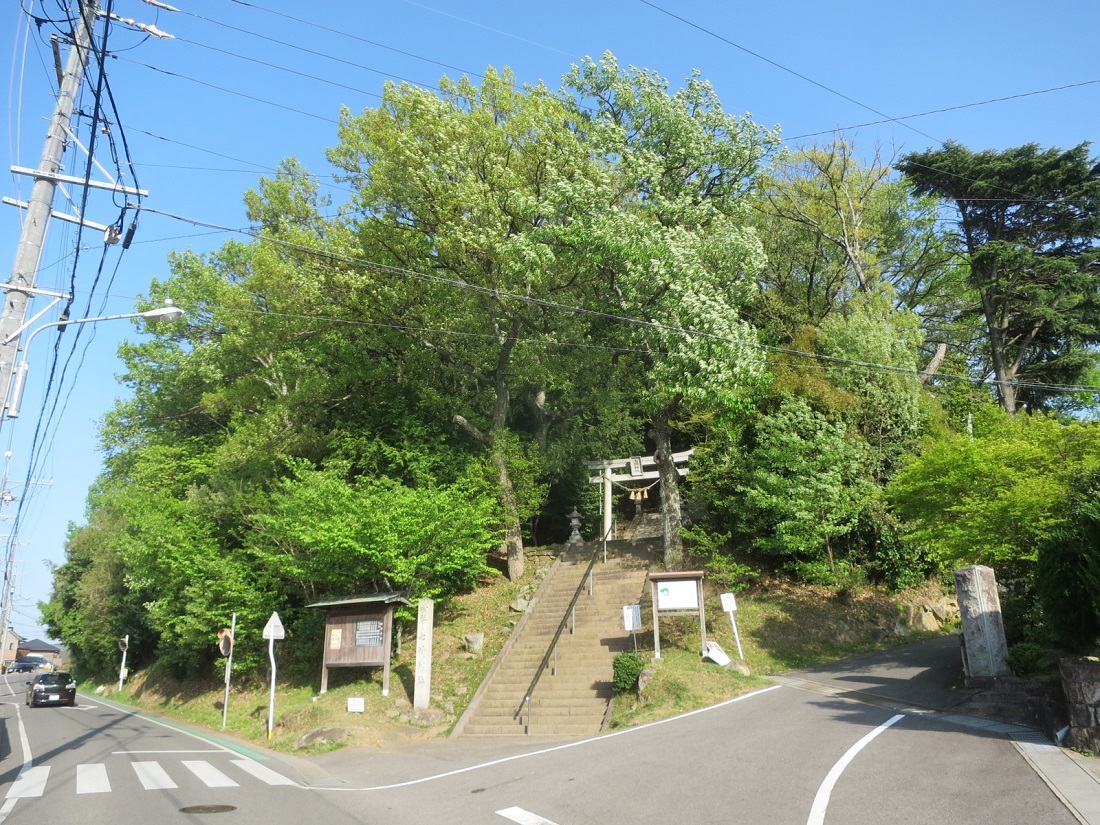 七所神社（岡崎市百々町）